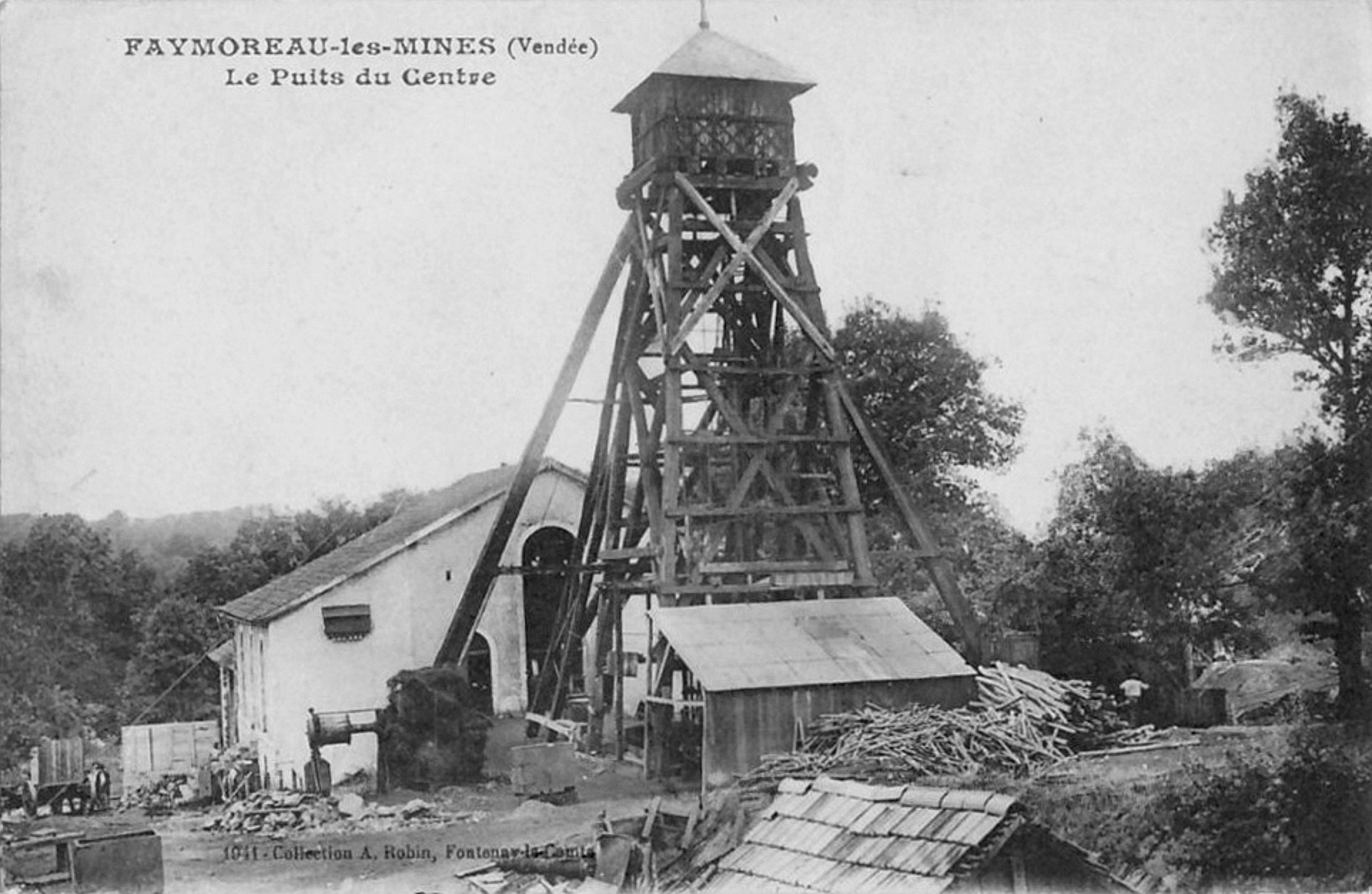 Le puits du Centre du bassin houiller de Faymoreau (Vendée, France).